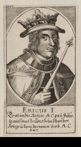 Horik 1. var dansk konge fra 814-854, indtil 827/28 samregerende med andre konger. I 1600-tallet og 1700-tallet udsendtes en række forskellige kobberstiksværker og samlinger med, overvejende tænkte, portrætter af alle danske konger fra den formodet første konge, kong Dan, og indtil den aktuelt regerende konge.